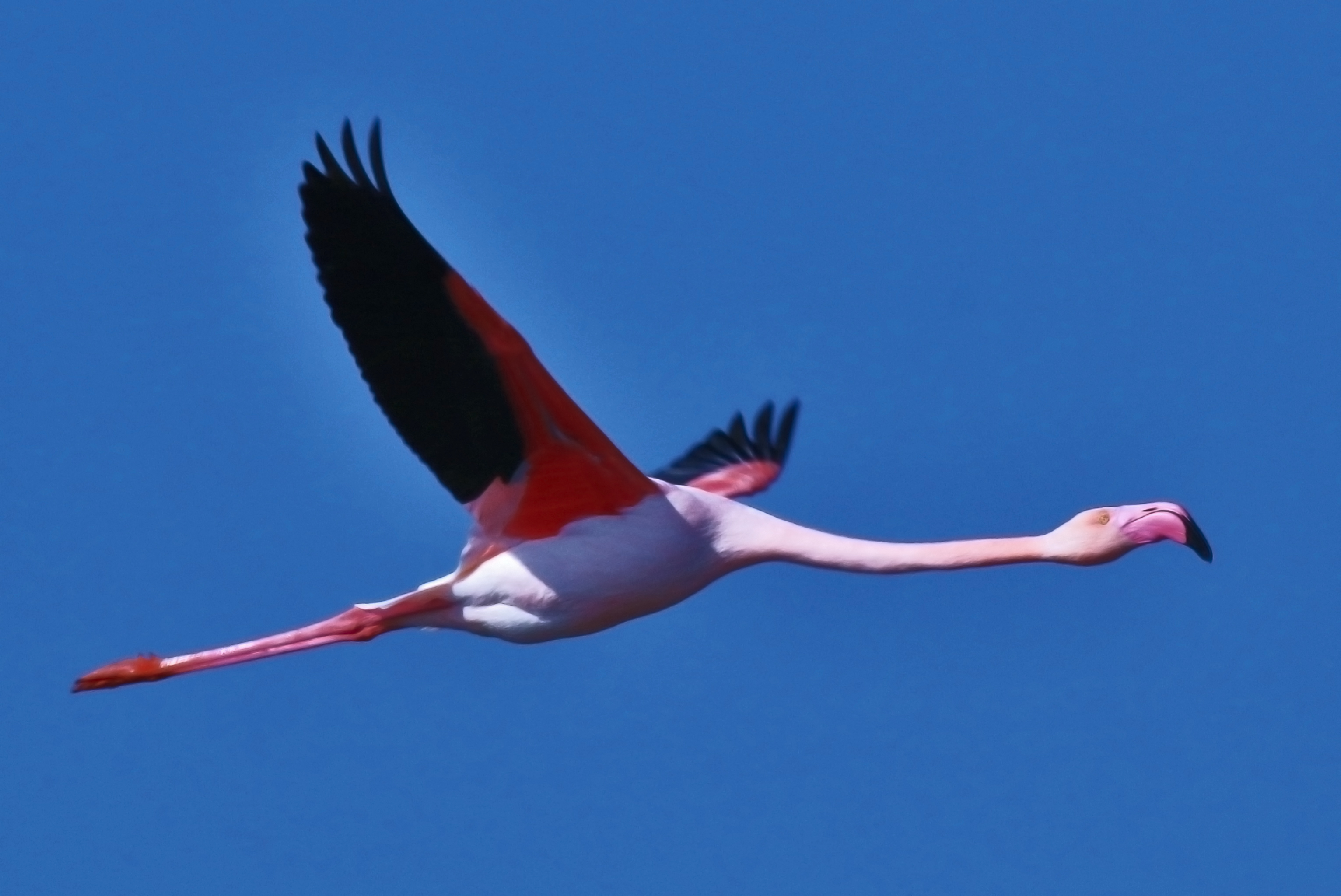 Réserve de Camargue 13